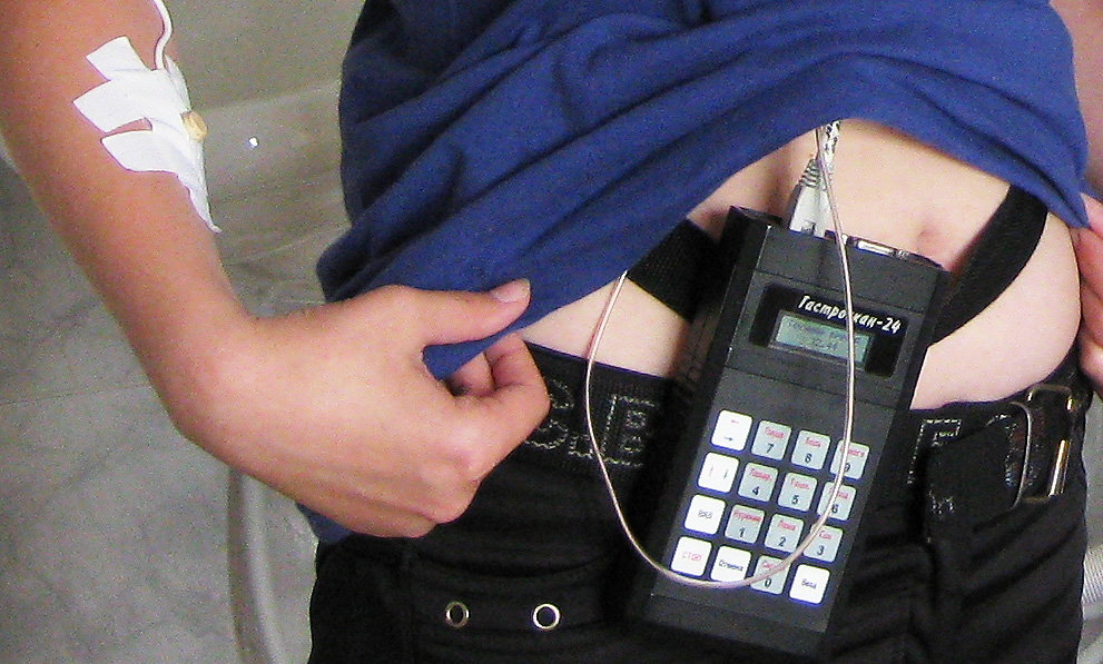 Проведение 24-х часовой рН-метрии при помощи прибора "Гастроскан-24"